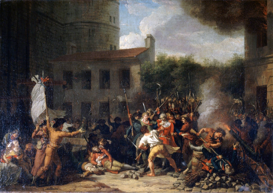 Exposée au Salon de 1793, la toile de Thévenin recompose une scène épique. Sur fond de canonnades, un petit groupe de patriotes s’empare du gouverneur, M. de Launay, qui «avait perdu la tête avant qu’on la lui coupât» (Rivarol). A cette figure blême, cette silhouette contournée, le peintre oppose la stature herculéenne des jeunes révolutionnaires, la dynamique harmonieuse de leurs attitudes et l’éclat du jaune, du rouge et du bleu primaires de leur costumes. «L’Ancien Régime et la Révolution venaient de se voir face à face et celle-ci laissait l’autre saisie de stupeur» (Michelet).